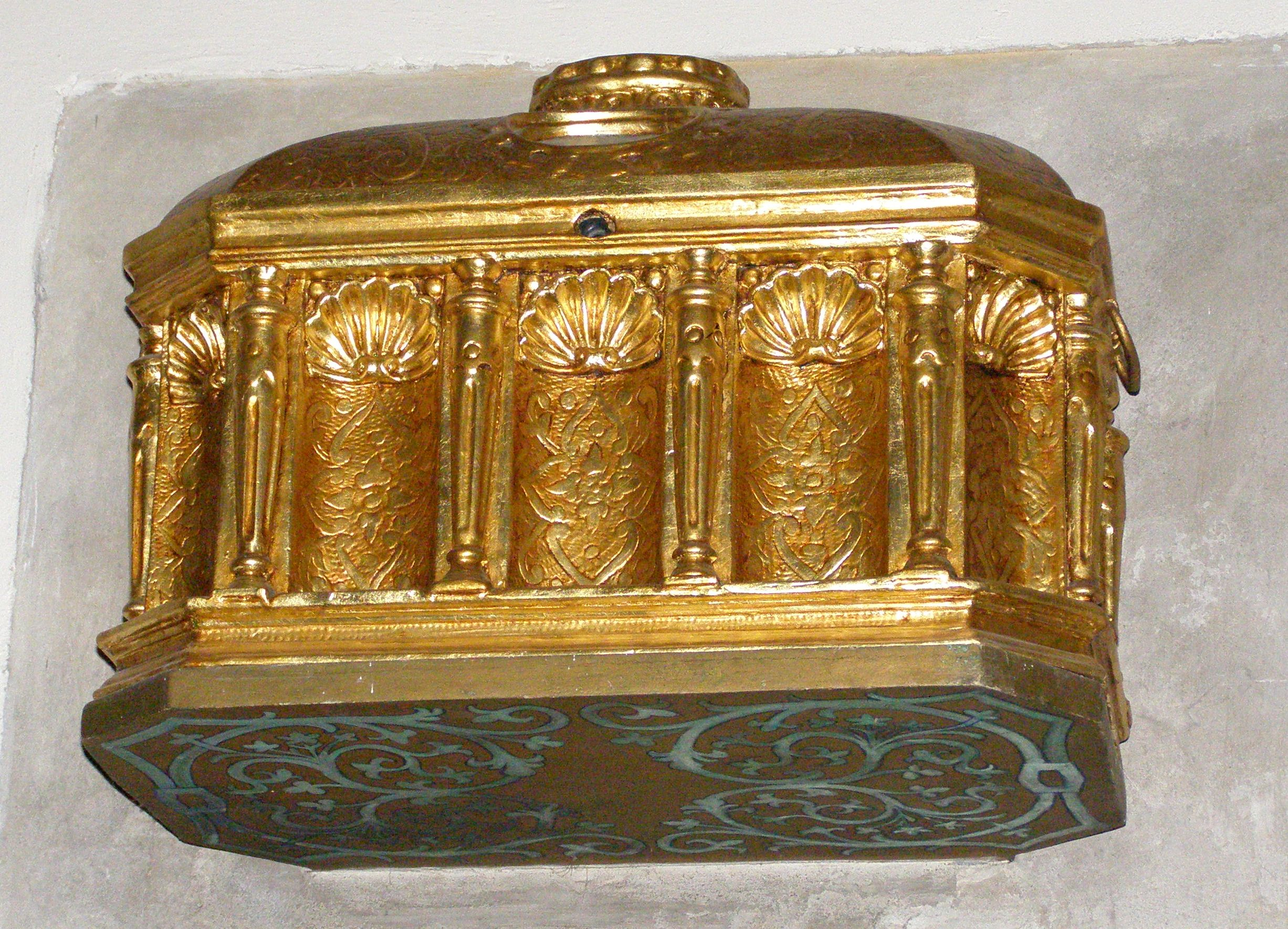 Relikwiarz Benedykta, Jana, Mateusza, Izaaka i Krystyna - pierwszych męczenników Polski, kościół w Kazimierzu Biskupim